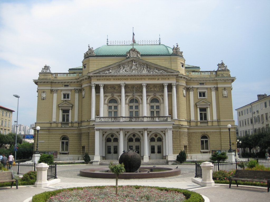 HNK Ivana Plemenitog Zajca, Rijeka, Croatia